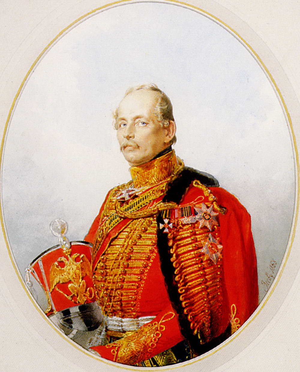 Портрет Николая Фёдоровича Плаутина кисти Михаила Александровича Зичи